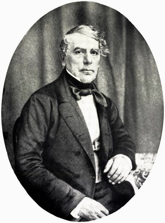 Christopher Henrik Holfeldt Tostrup, trelasthandler